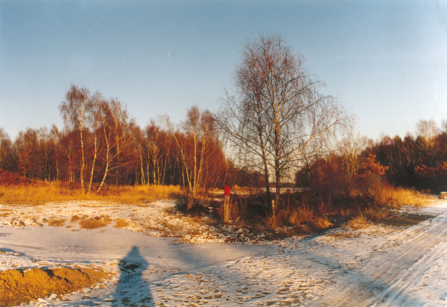 Typische Landschaft in der Wahner Heide im Winter